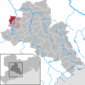 Königsfeld in Saxony - district Mittelsachsen